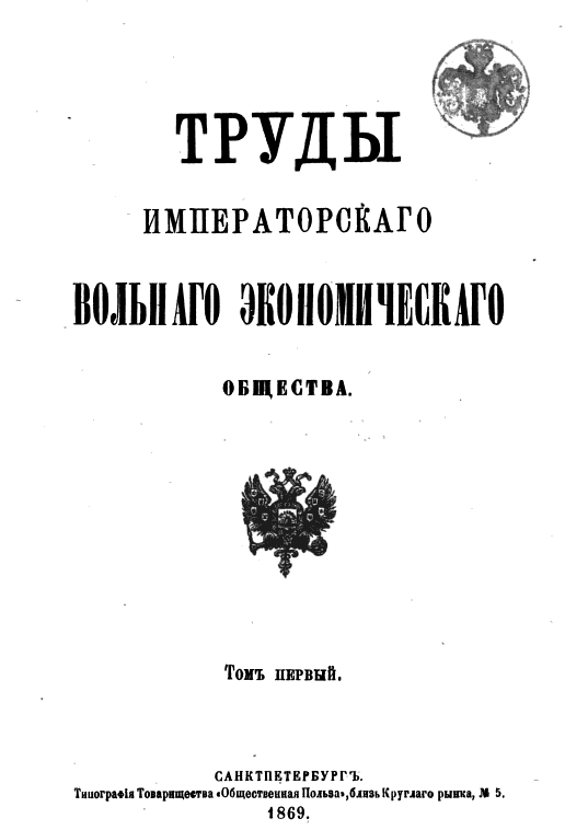 Обложка журнала «Труды Императорского вольного экономического общества»